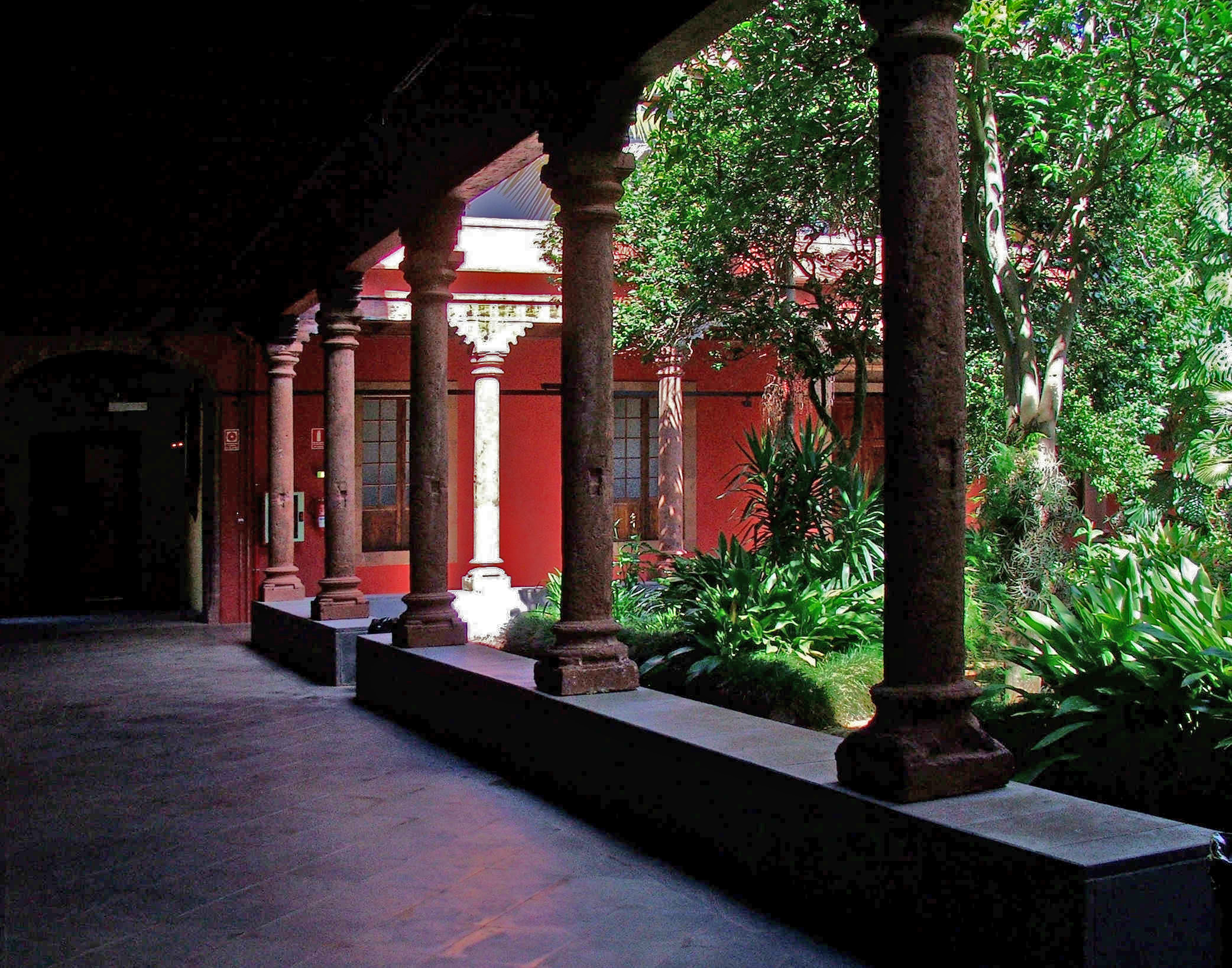 Convento de San Agustin Patio